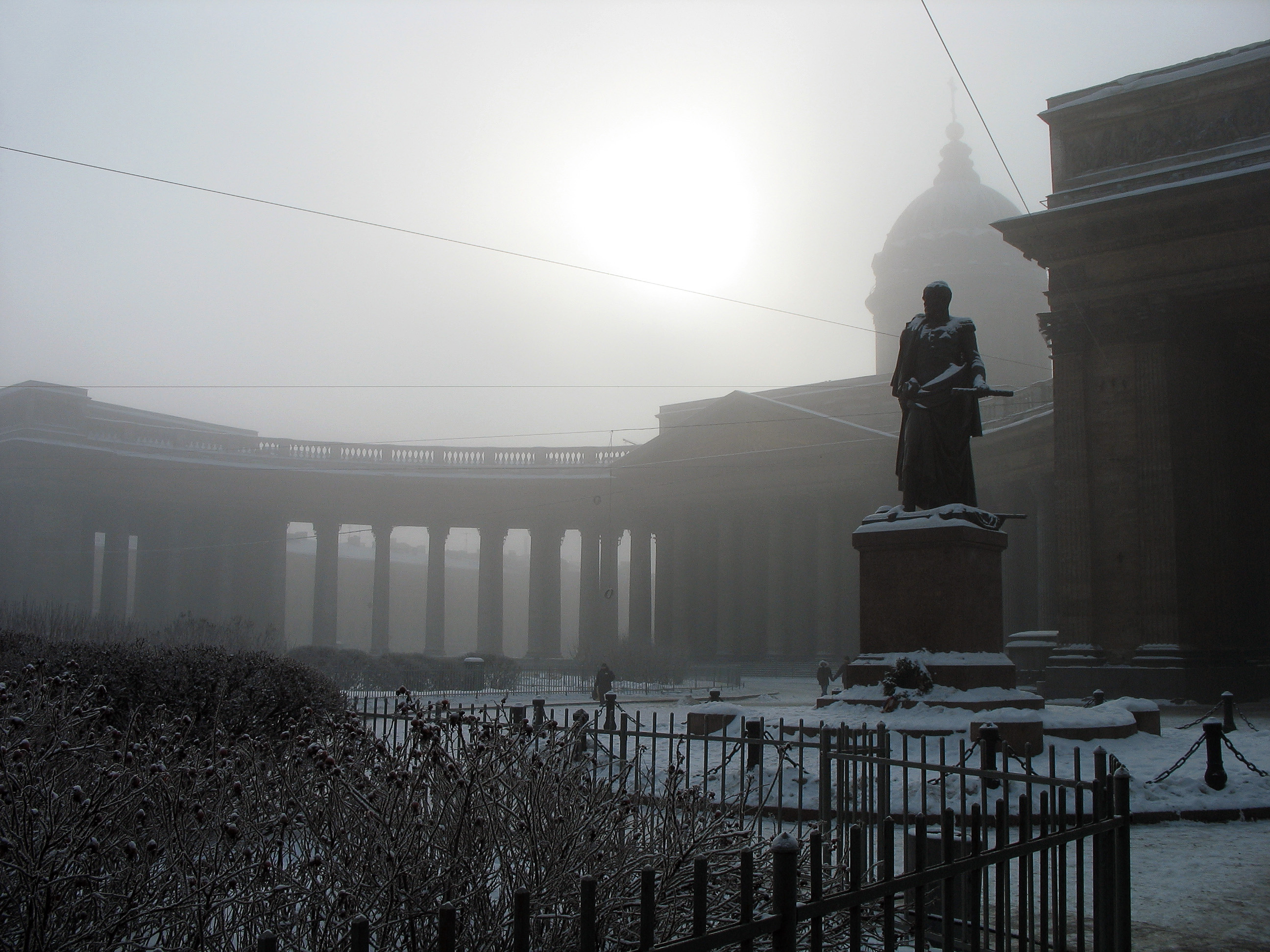 Памятник Барклаю-де-Толли у Казанского собора.